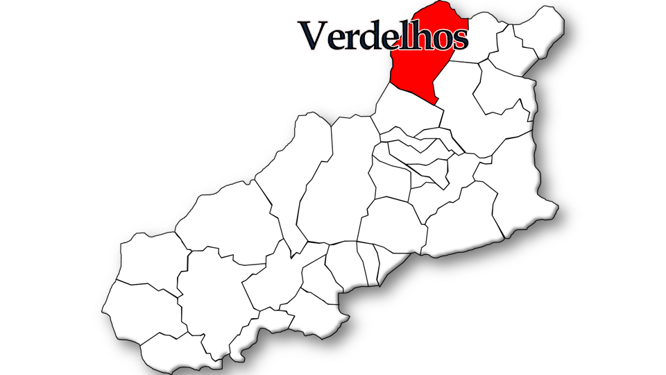 População